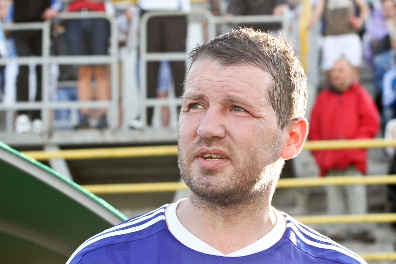 Олег Саленко - український та російський футболіст, нападник збірної Росії, найкращий бомбардир Чемпіонату світу з футболу 1994 року, рекордсмен чемпіонатів світу за кількістю м'ячів, забитих в одному матчі.